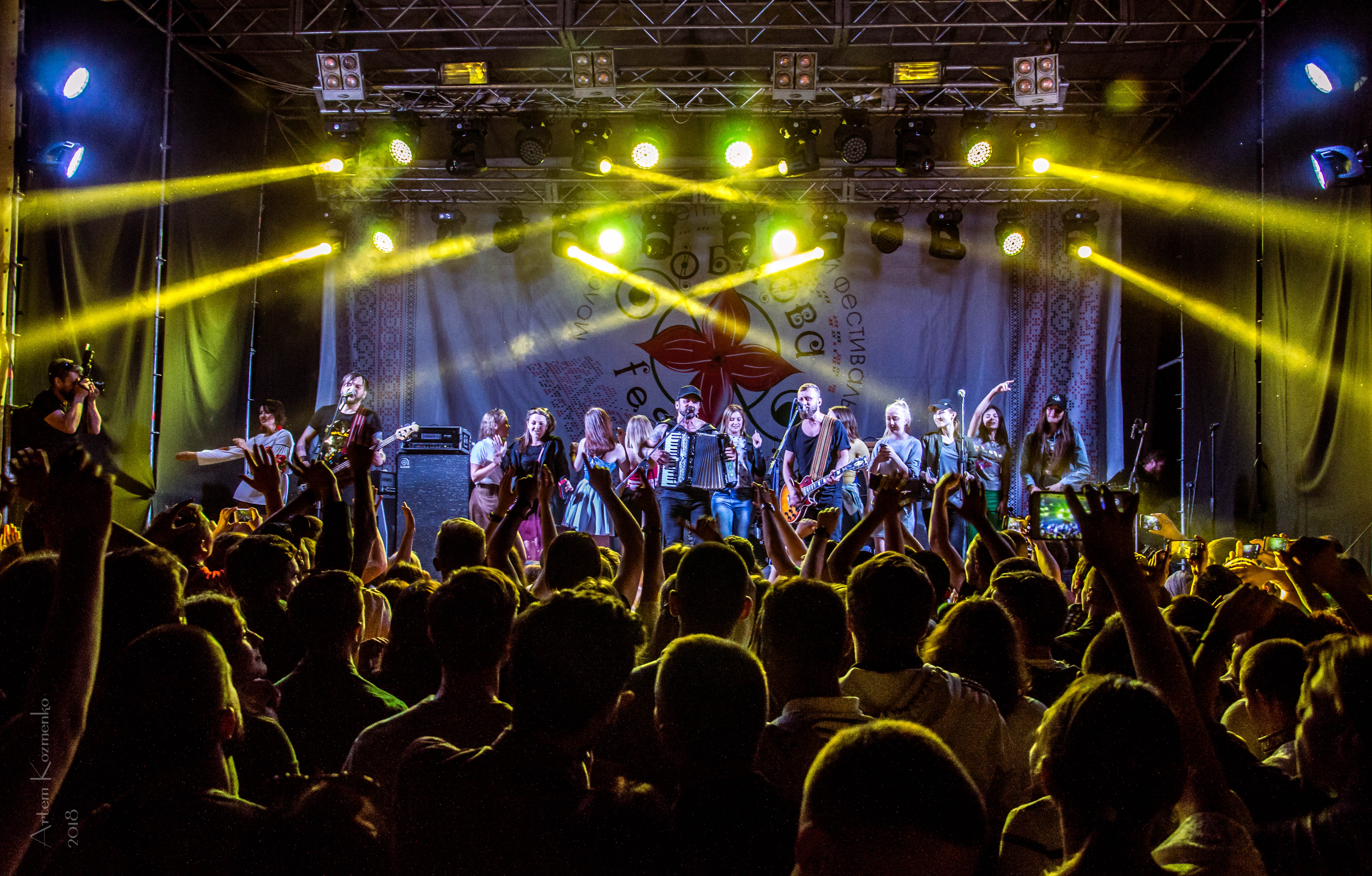 Обнова-фест 2018. Фото А.Козменка